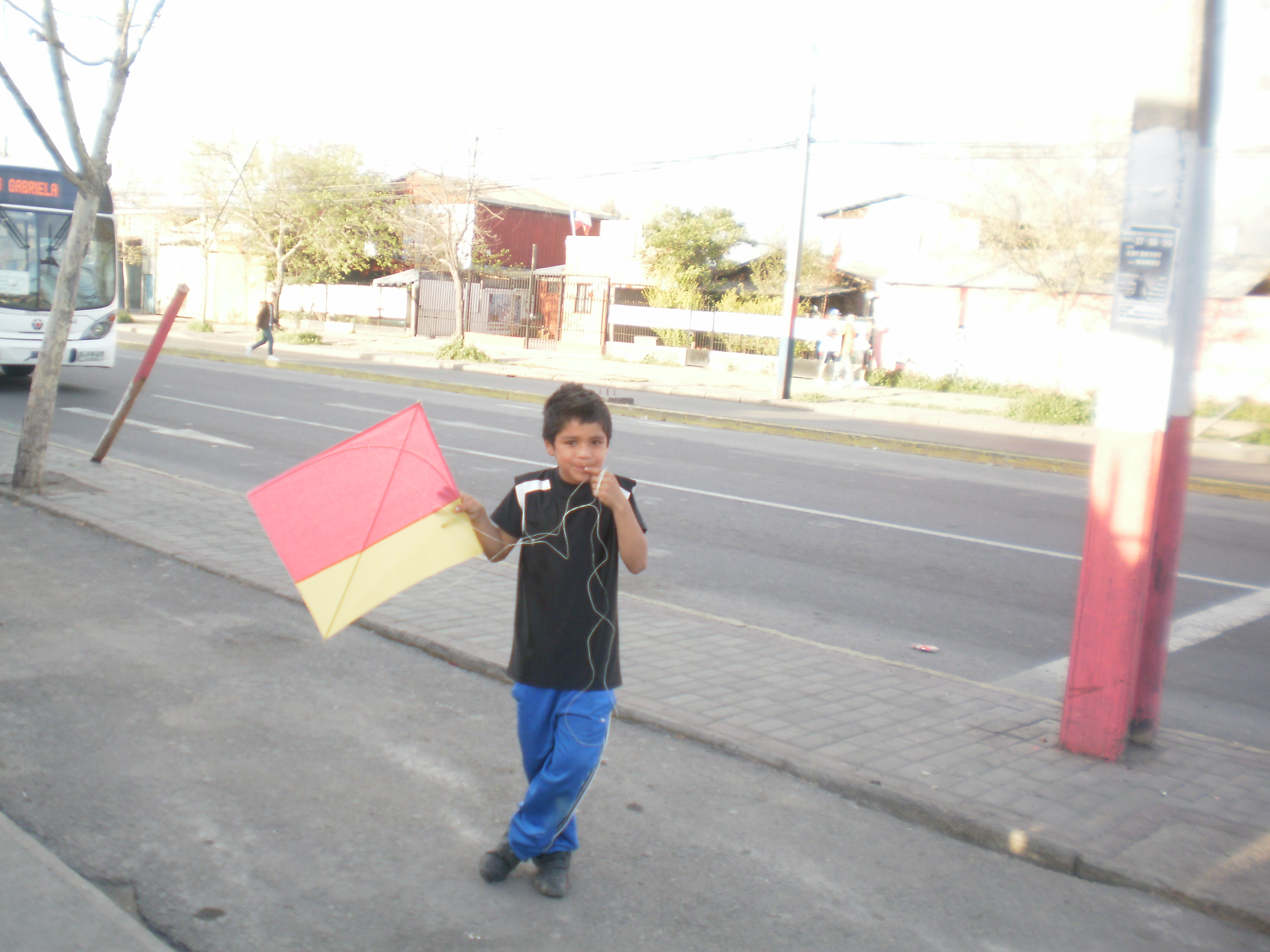 Niño que atrapó un volantín (cometa) cortado en el aire por un rival con hilo curado